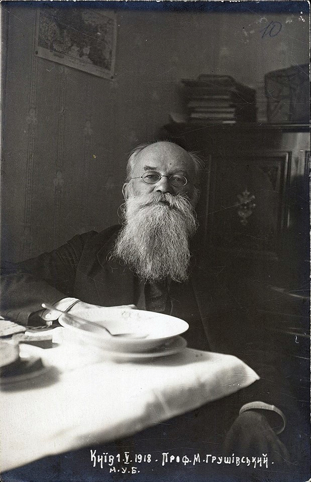 "Розсекречена історія". Михайло Грушевський UA-Перший. Фото 1918 року.